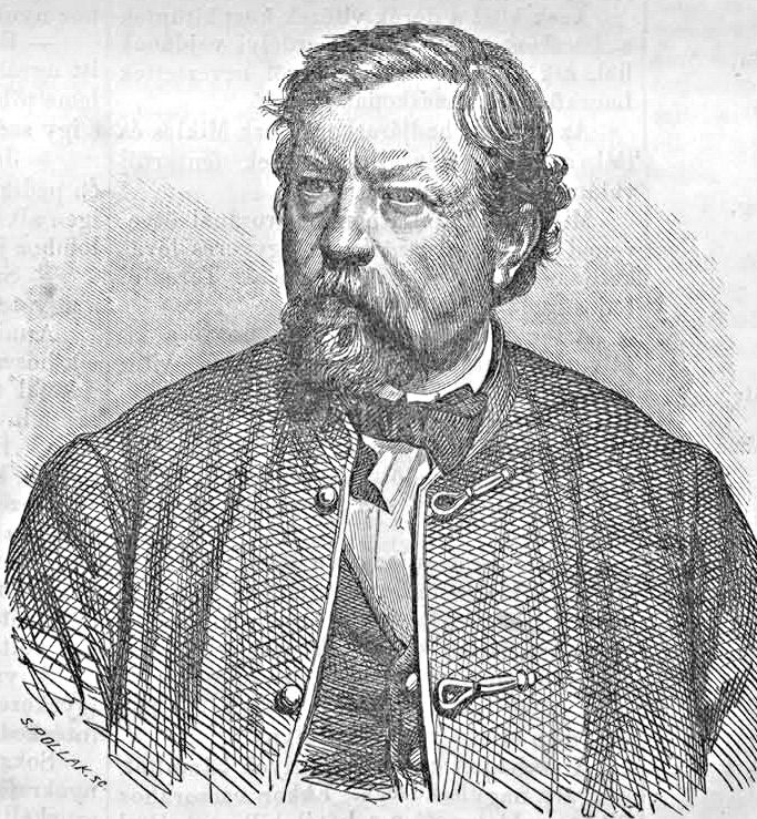 Ybl Miklós (1814–1891) építész. Pollák Zsigmond metszete (Vasárnapi Ujság, 1865. március 26.)